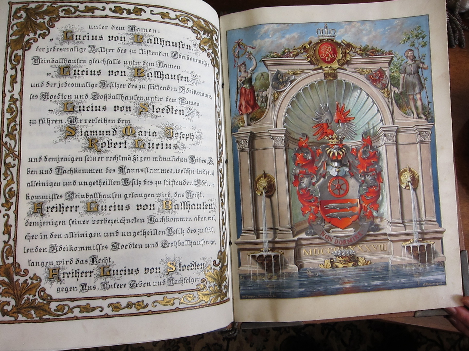 Nobilitierungsurkunde des Robert Lucius (1835-1914)